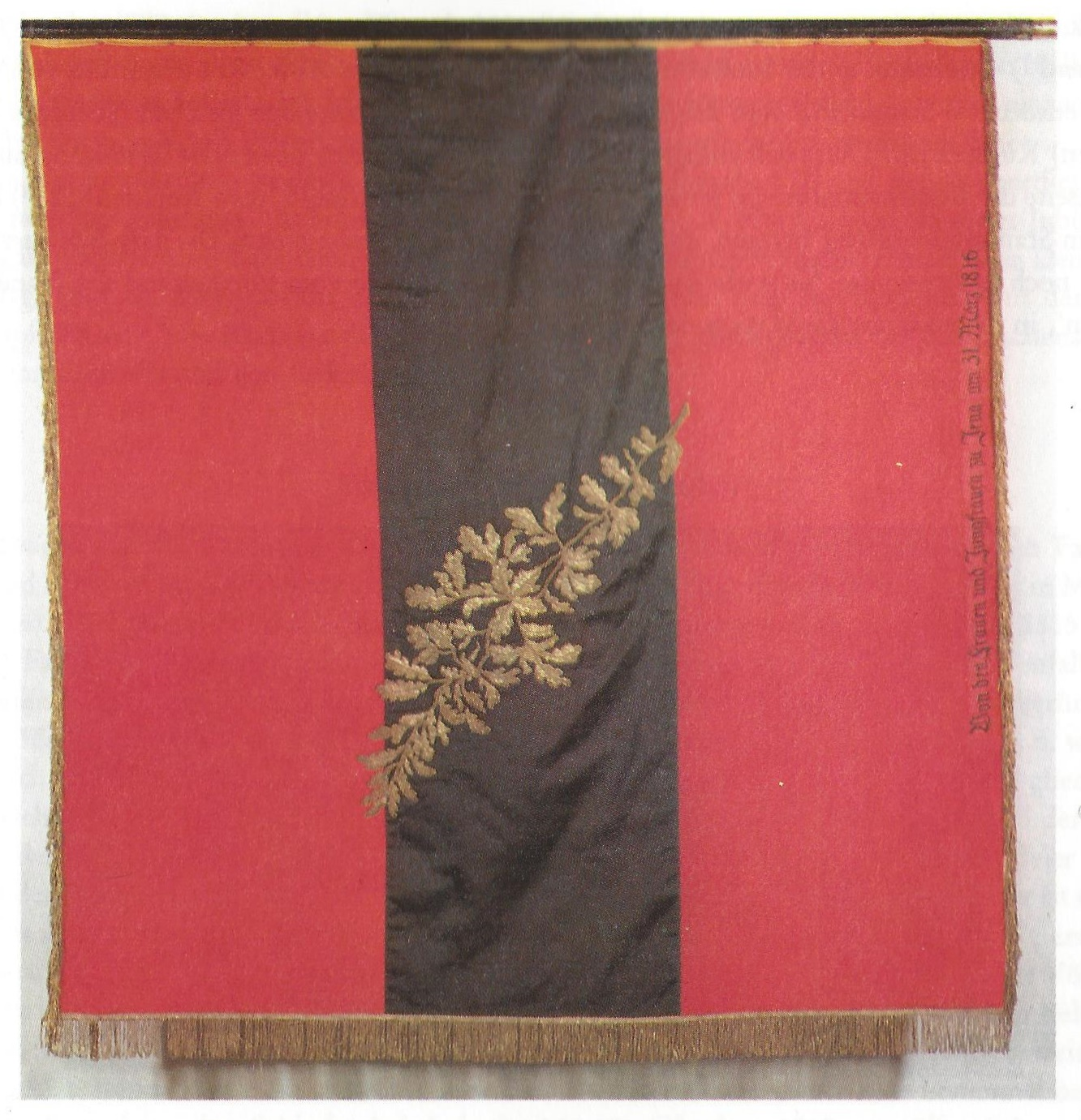 Fahne der Urburschenschaft (1816)